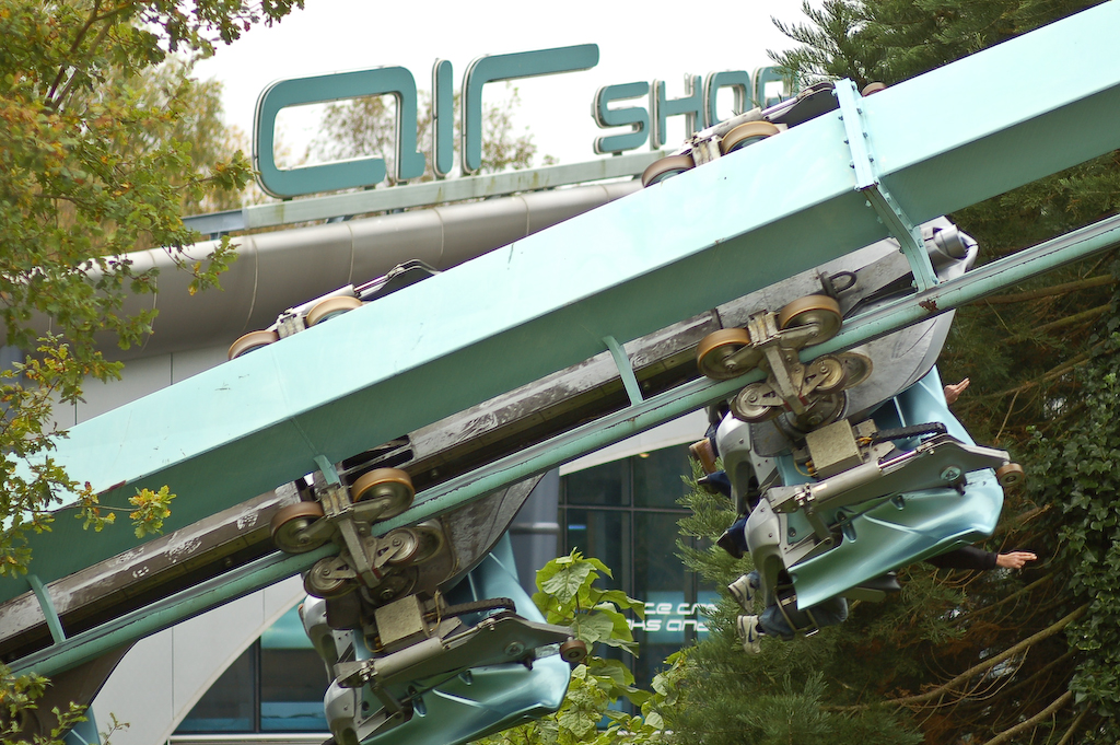 Air , montagnes russes à Alton Towers